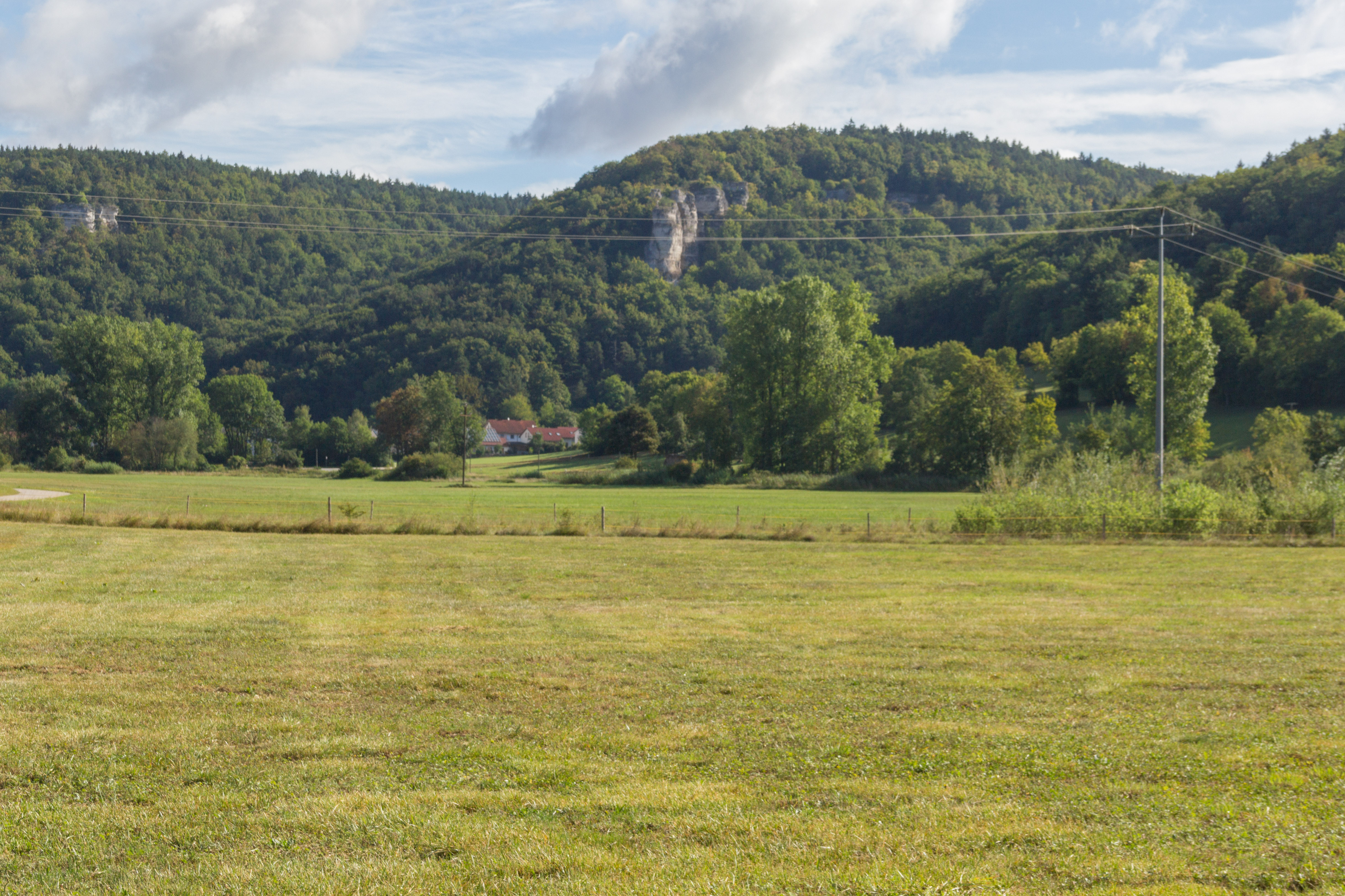 Mühlbach, Dietfurt an der Altmühl, Kopffelsen